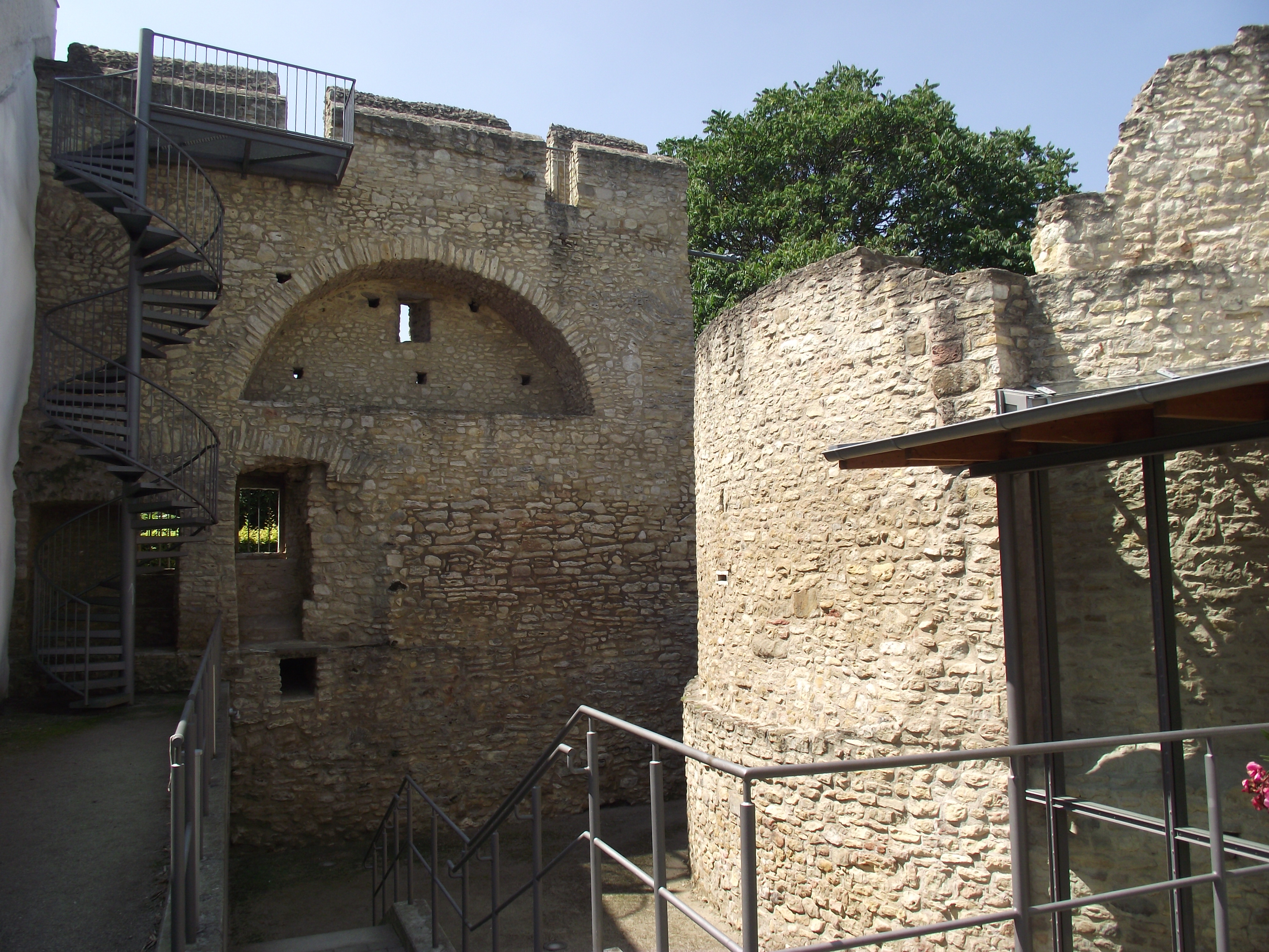 Aula Regia der Kaiserpfalz in Nieder-Ingelheim